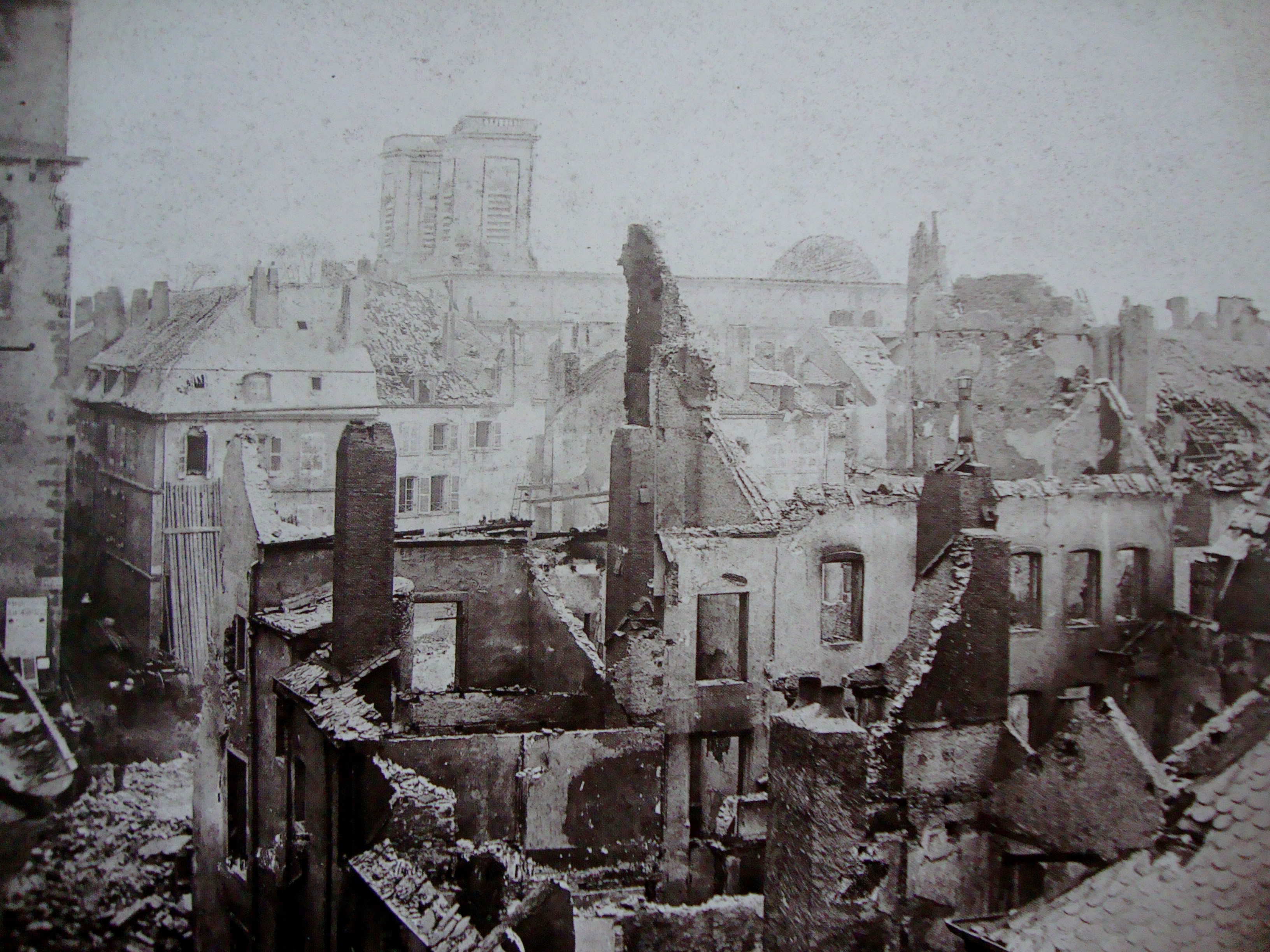 Thionville (57), en 1870